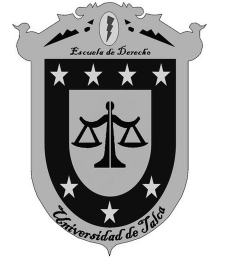 Escudo de la Escuela de Derecho Utalca